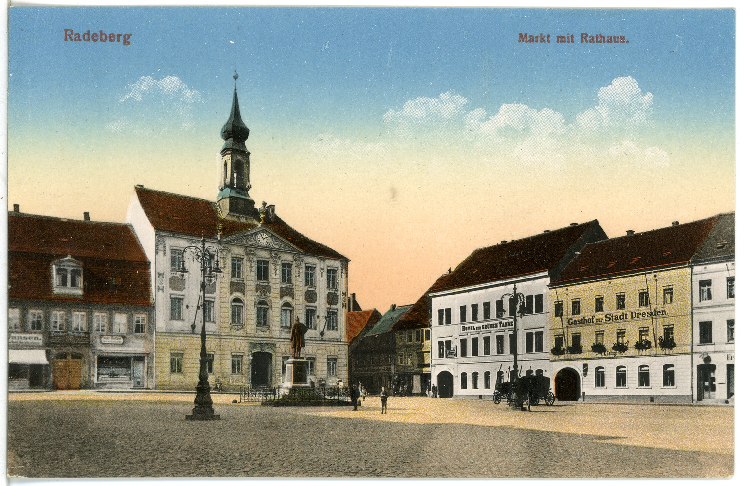 Radeberg; Markt mit Rathaus This postcard is from publisher Brück & Sohn in Meißen ( postcard has a unique number 20132 and is available in a higher resolution at the publisher. This images was uploaded in a cooperation project between Wikipedians and the publisher.